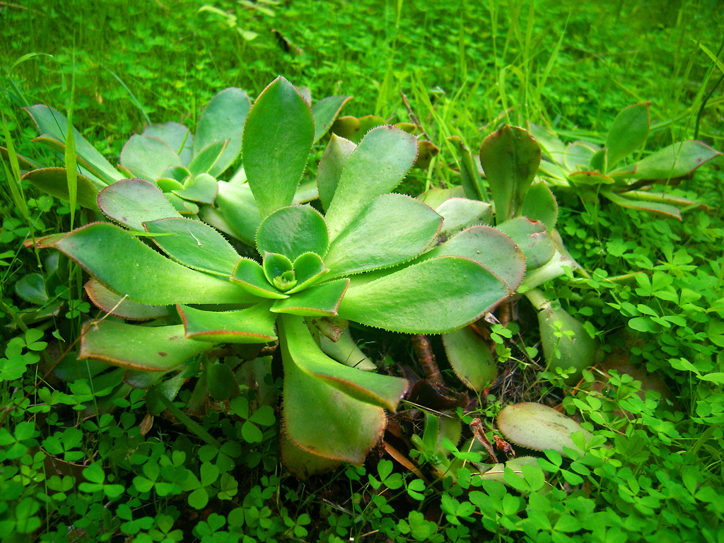 Bejeque tomado en la Isla de La Palma, tras una lluvia invernal.